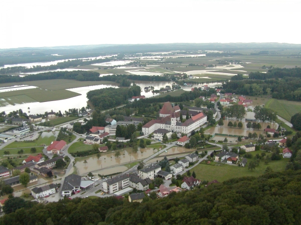 Luftbildaufnahme Augusthochwasser 2002 Baumgartenberg